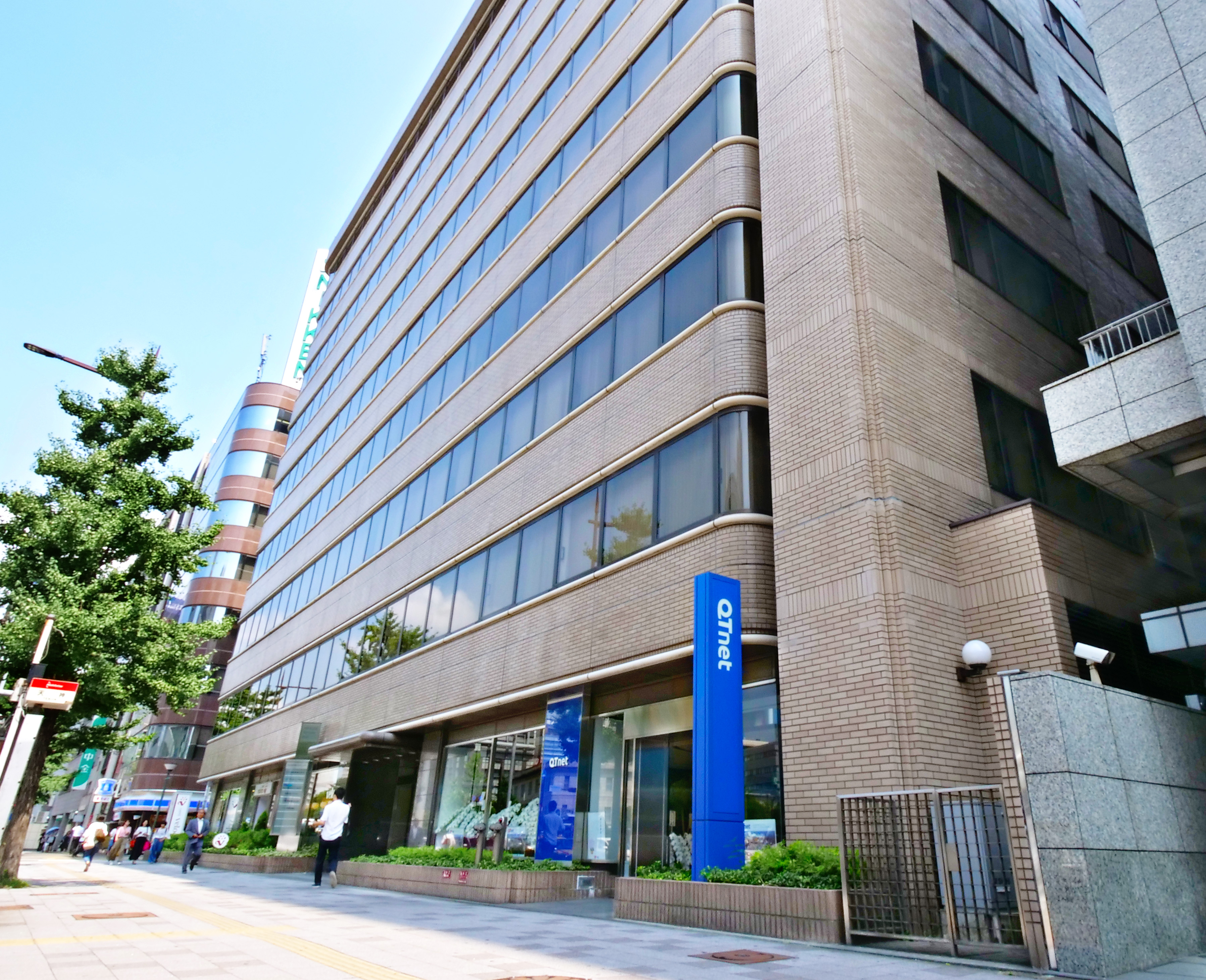 本店のある日之出天神ビル